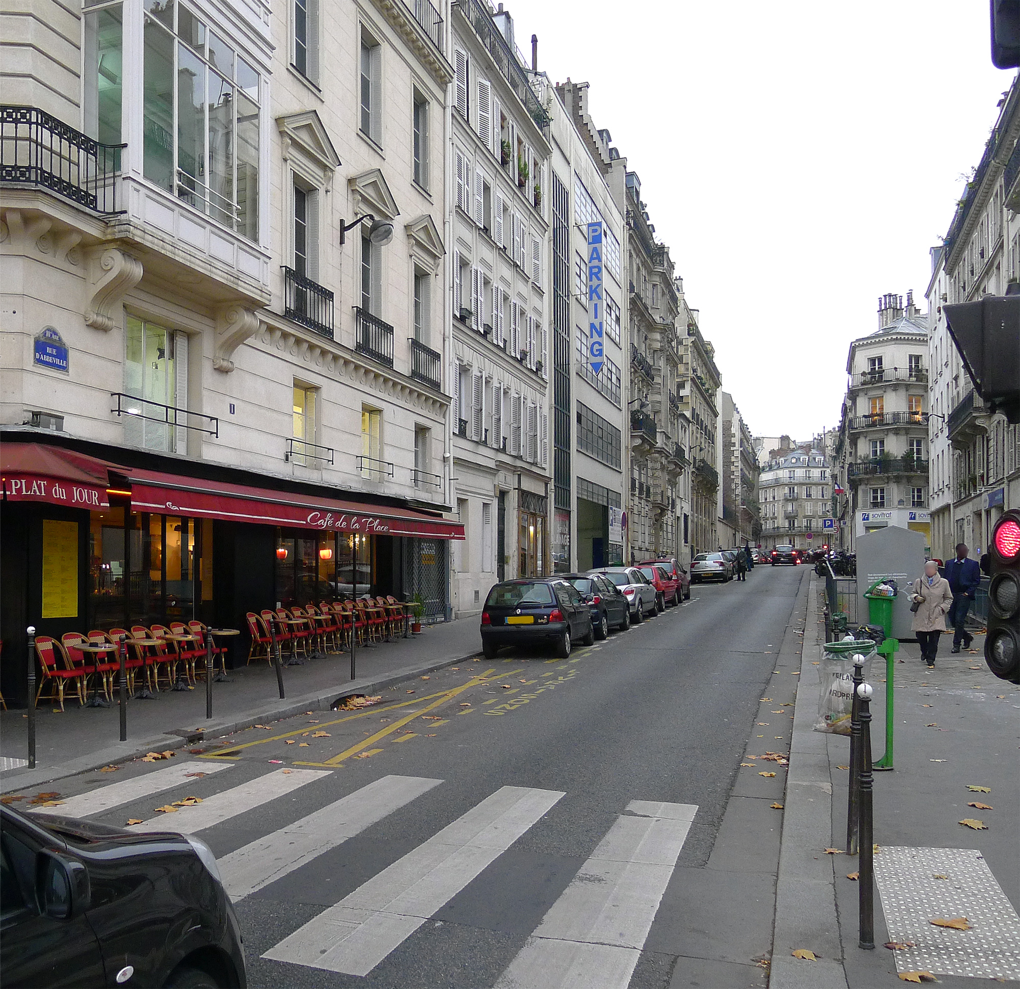 Rue d'Abbeville - Paris X